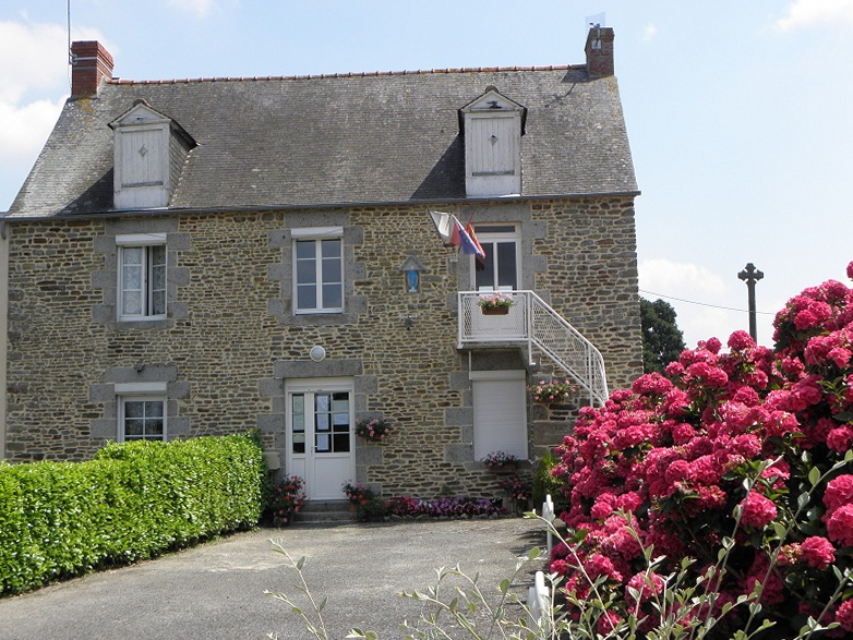 Mairie de Macey (50).